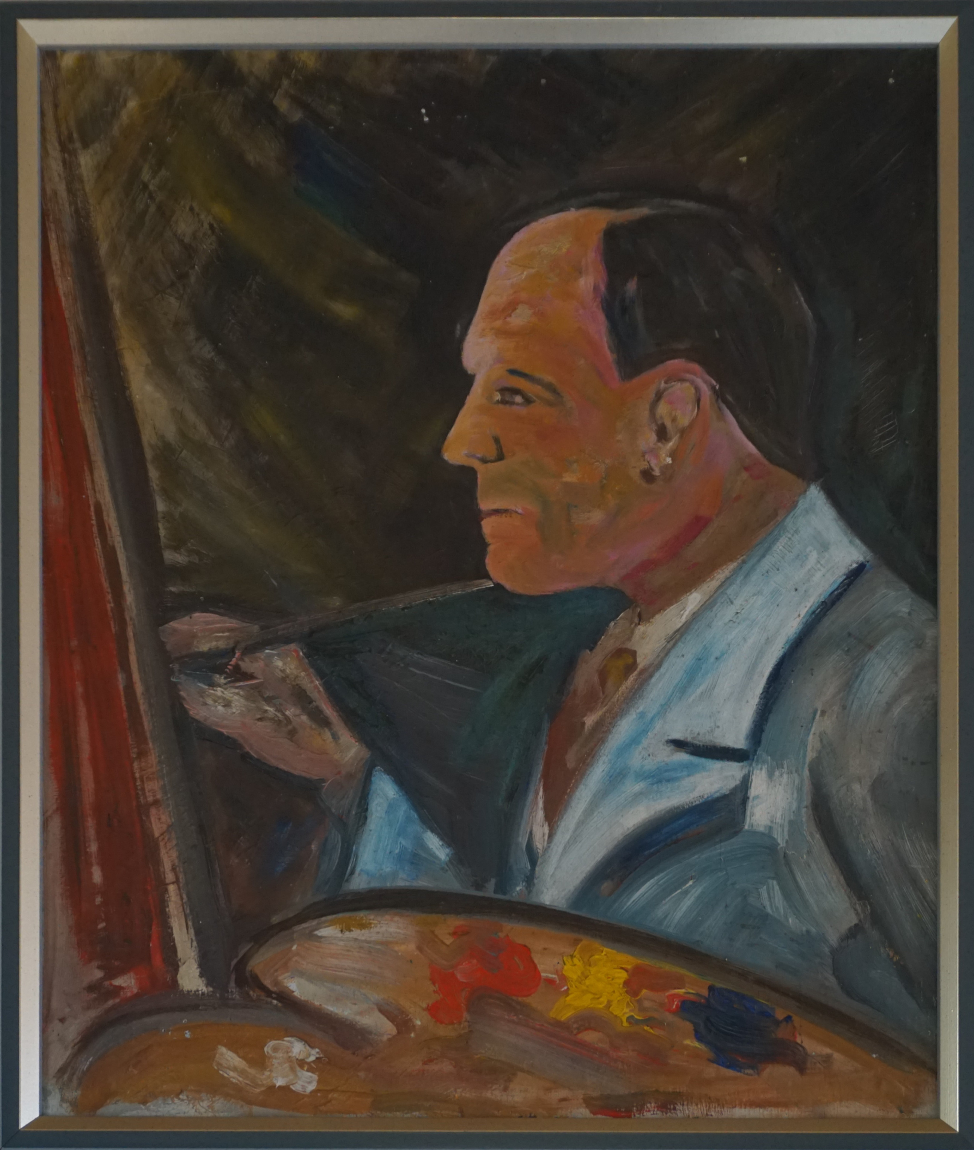 Selbstportrait von Otto Speidel